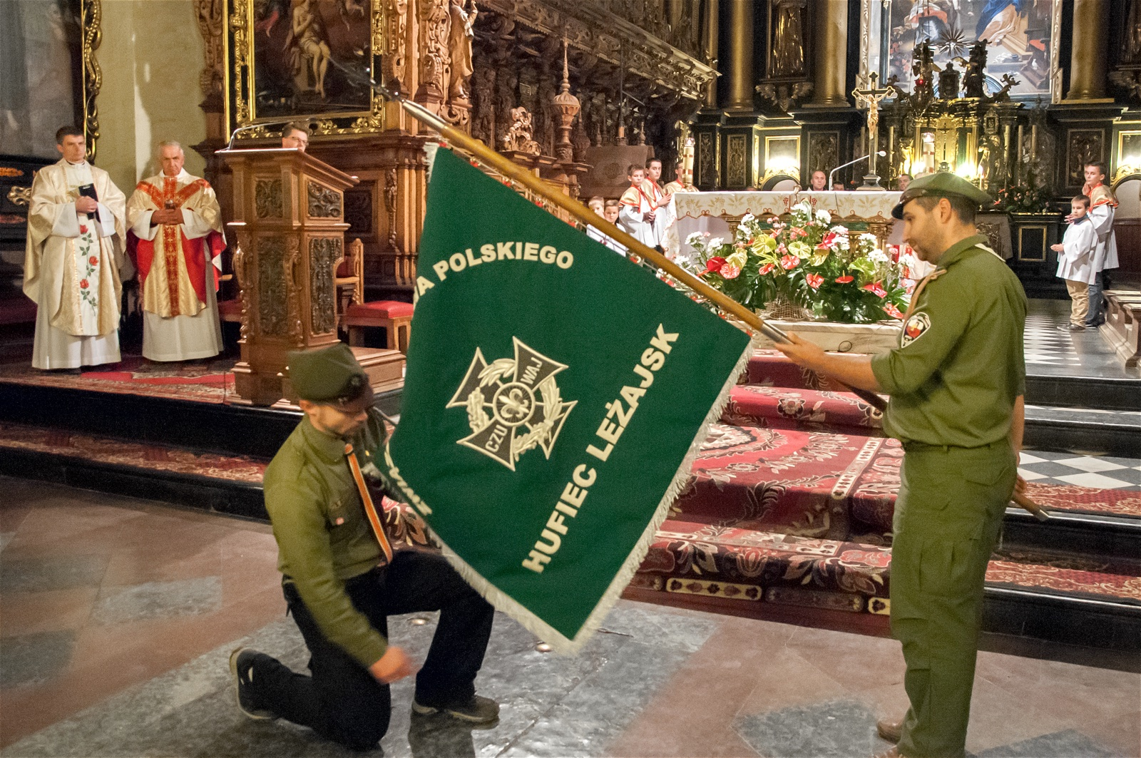 Komendant Chorągwi Podkarpackiej ZHP hm. Mariusz Bezdzietny HR wręcza sztandar Komendantowi Hufca Leżajsk phm. Damianowi Wyszyńskiemu